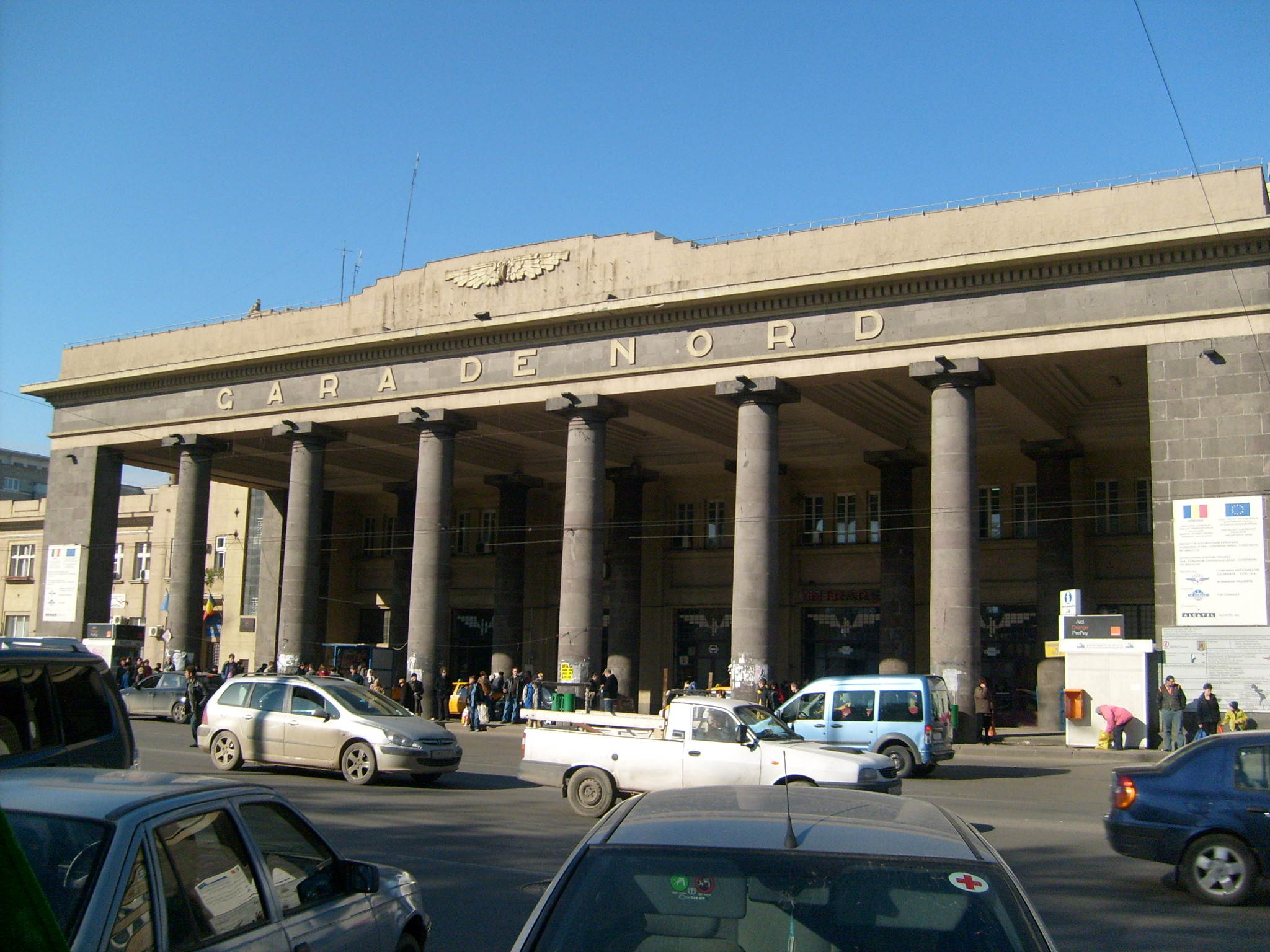 Gara de Nord, November 2007